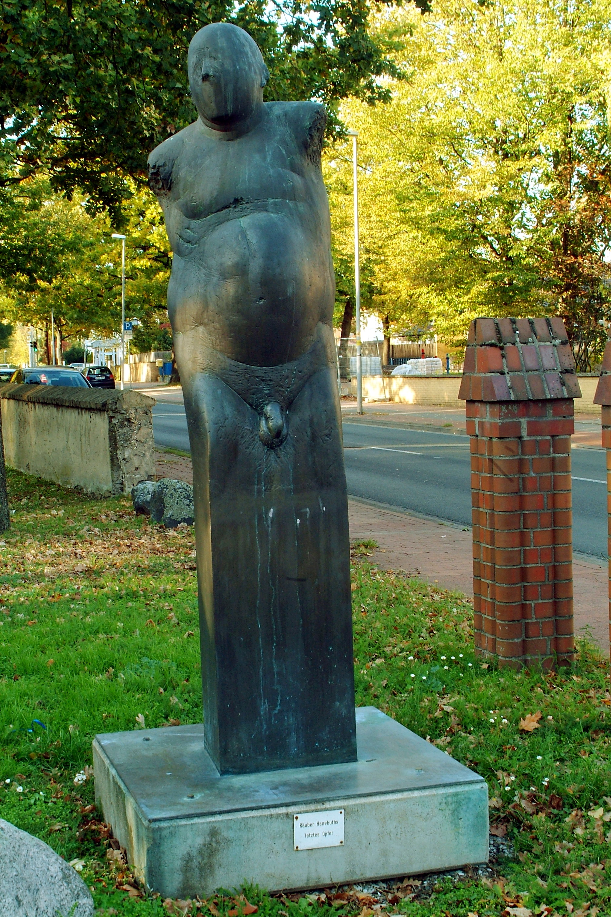 Großer Sockeltorso XX (1986/1987) von Waldemar Otto.